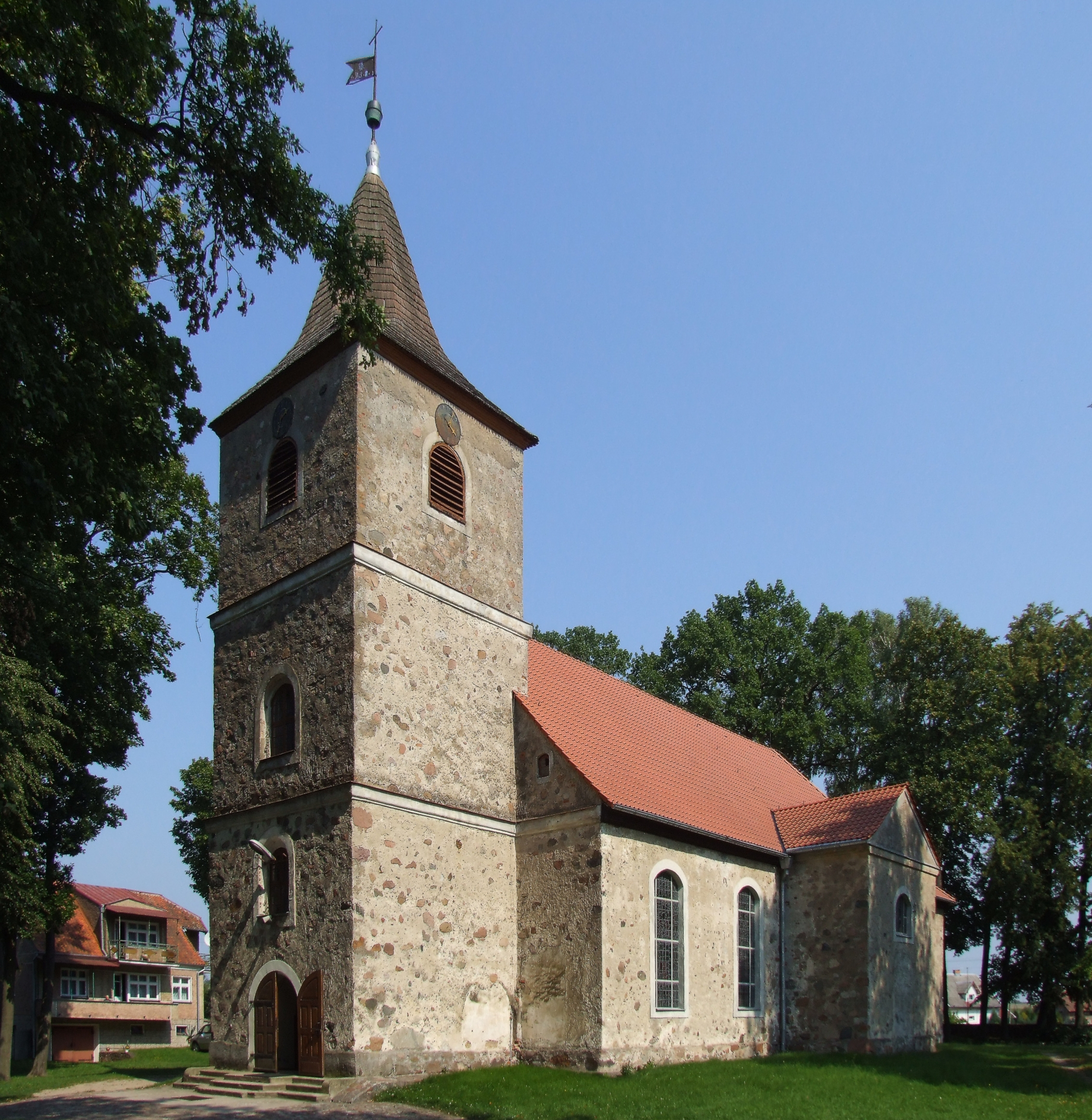 Straduny - kościoł